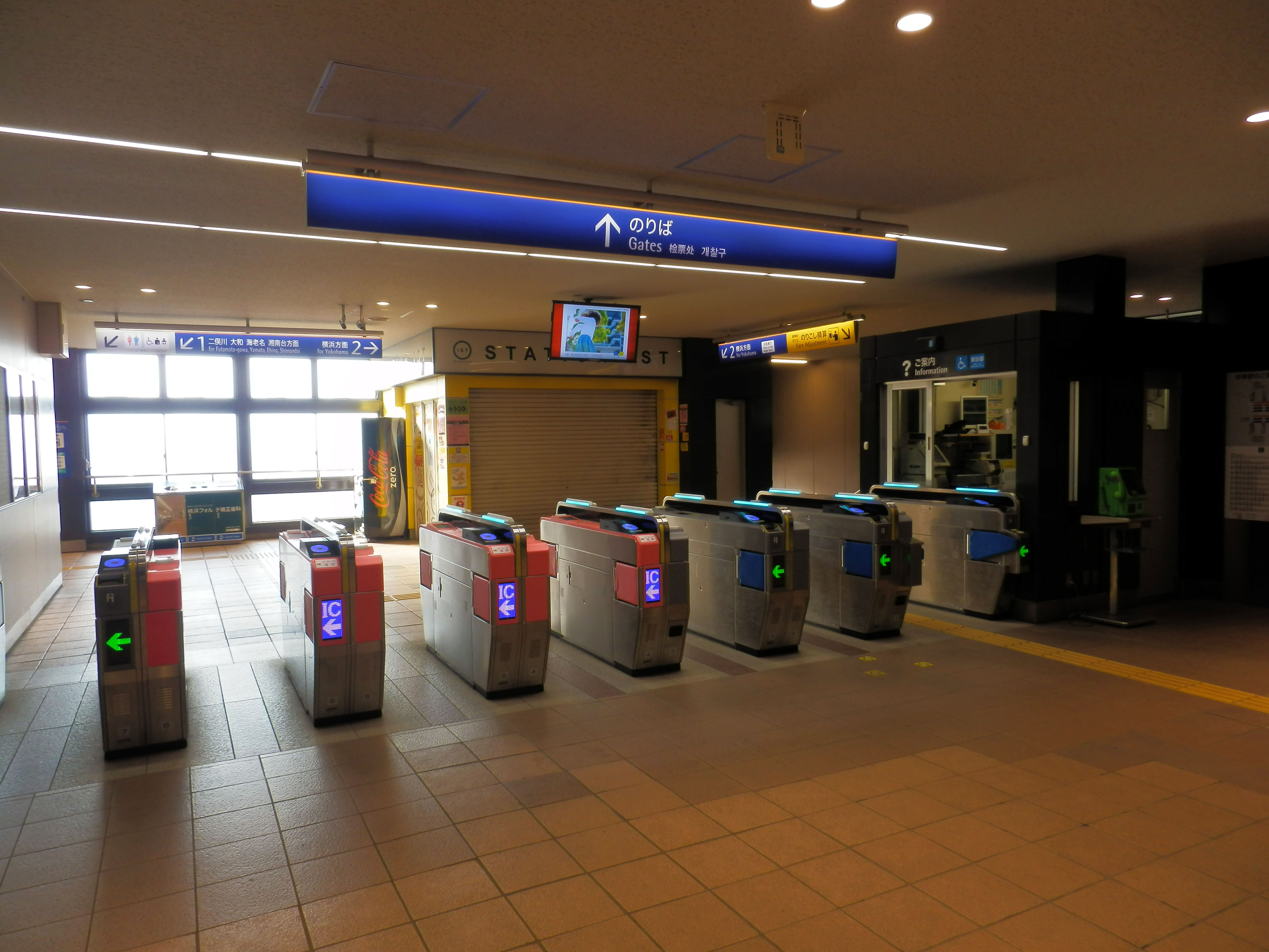 和田町駅改札口